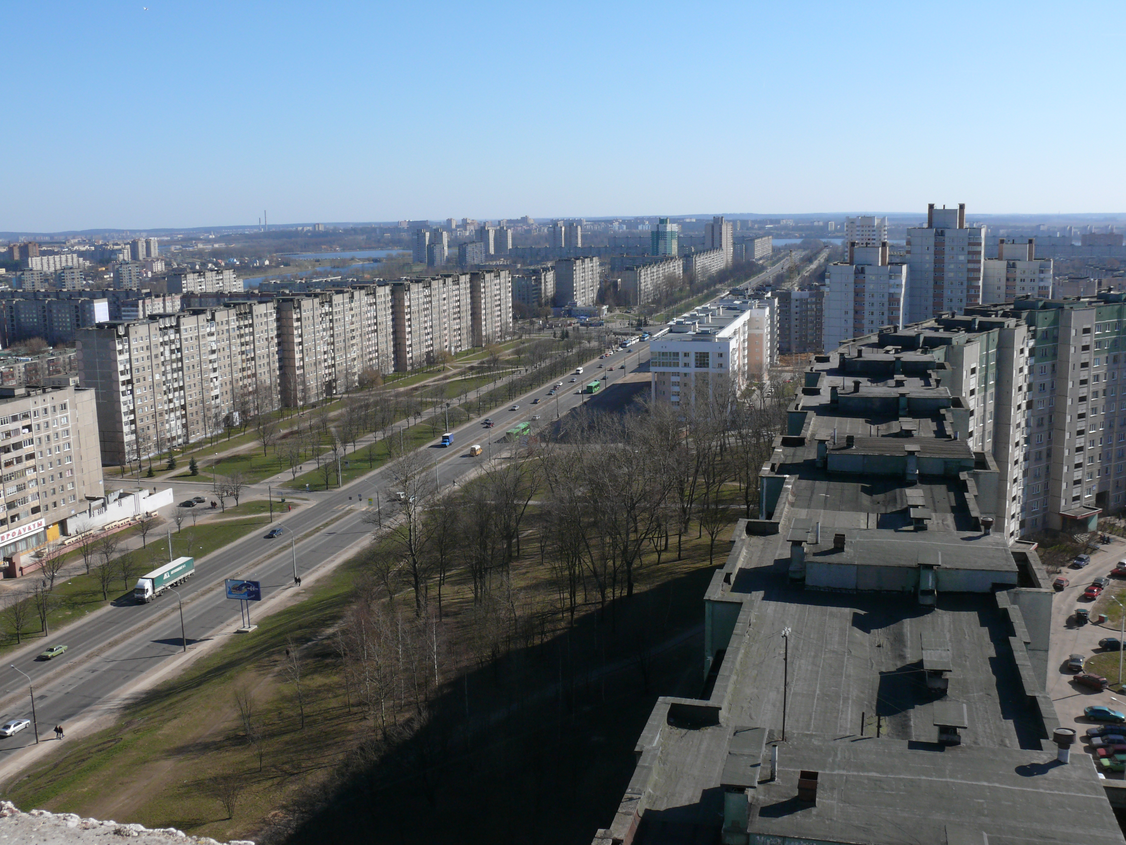 پښتو: Minsk Belaruss